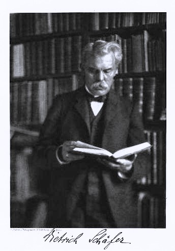 Portrait Dietrich Schäfer, von Rudolf Dührkoop (Heliogravüre einer Fotografie)